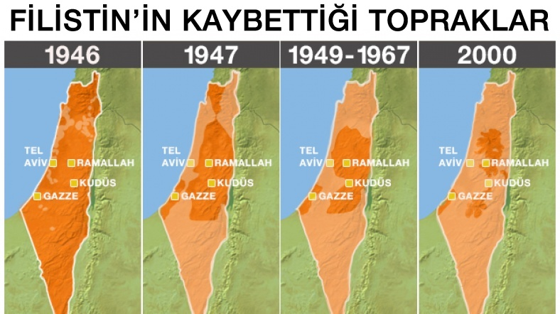 İsrail tarihi ile devam eden süreçte İsrail-Filistin çatışmalarının akıbeti ve İsrail'in Filistin toprakları başta olmak üzere genişlemesi, 7 Nisan 2014 (Al Jazeera, Türkçe)